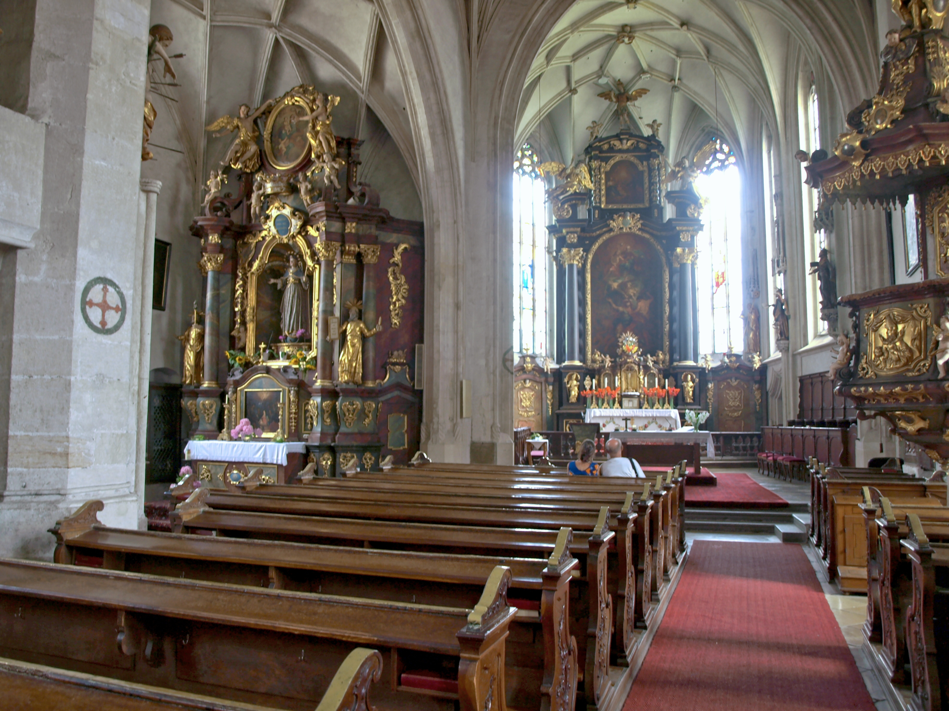 Kath. Pfarrkirche hl. Mauritius